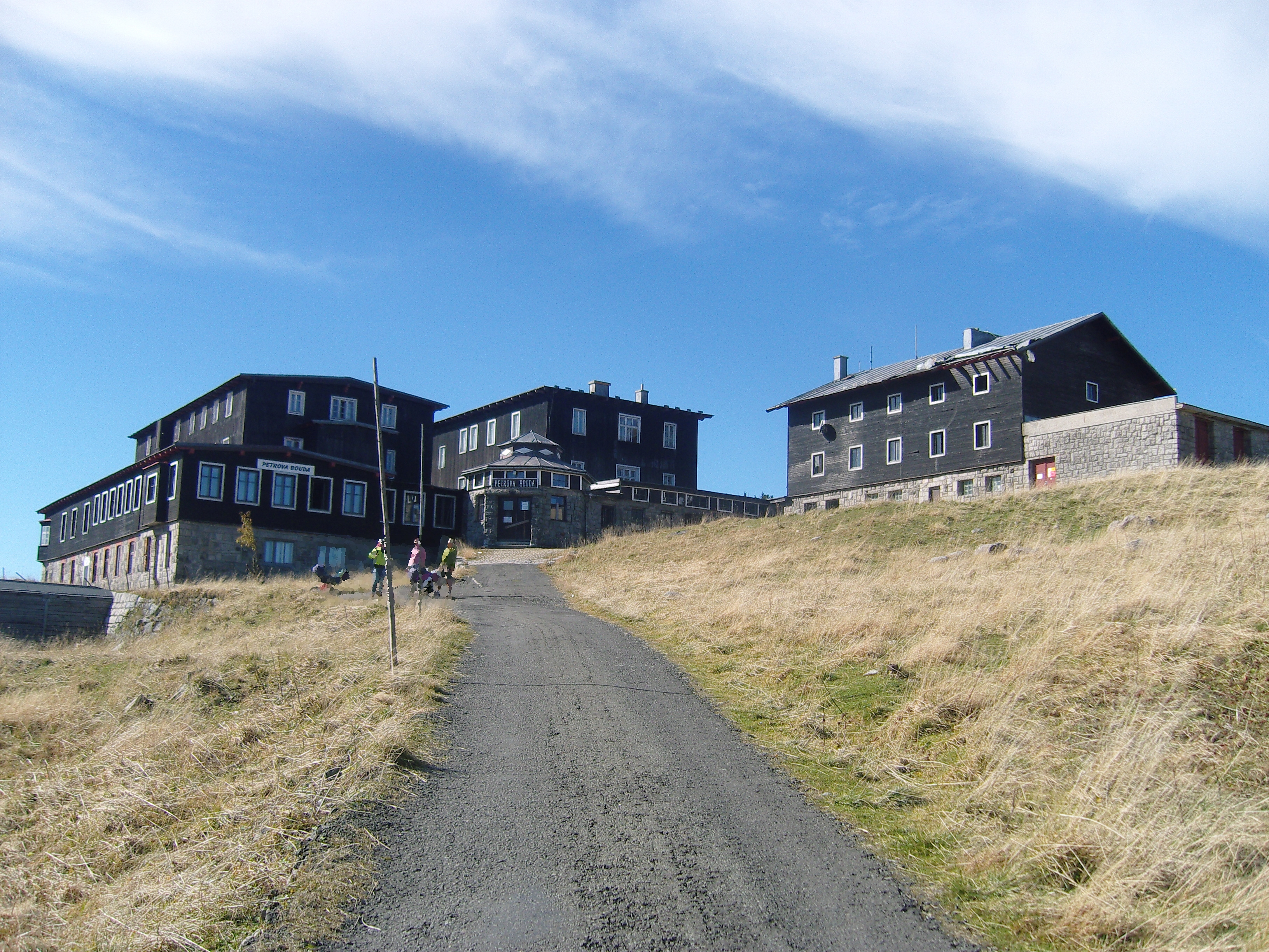 Peterbaude, Spindlermühle, Oktober 2010